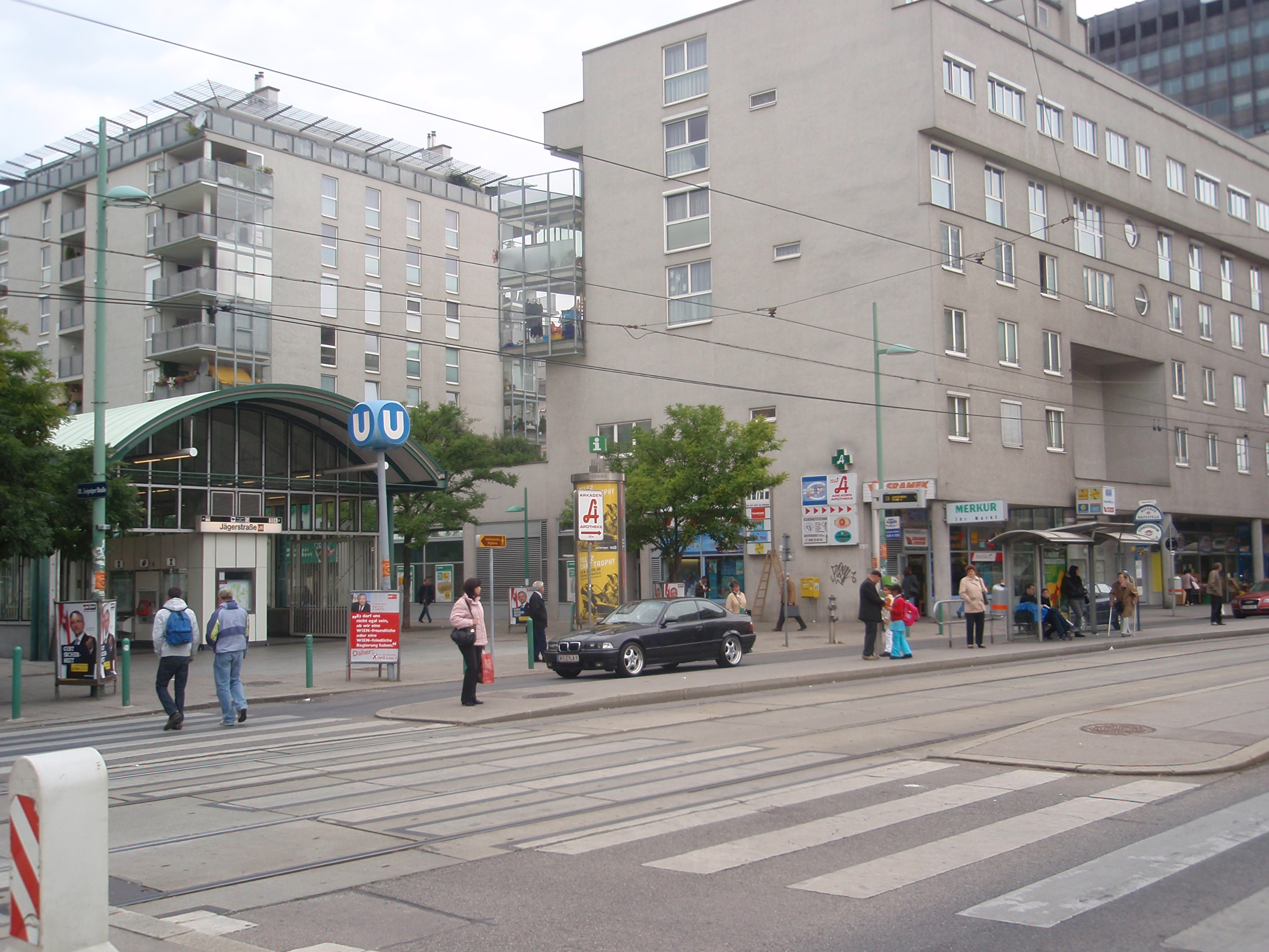 U6-Station Jägerstraße